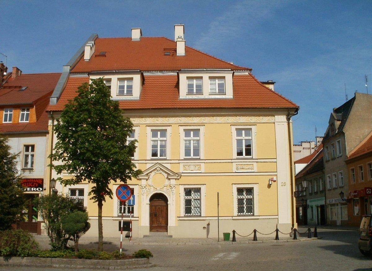 Wołów - budynek sądu rejonowego po remoncie. (zabytek nr A/2670/1779 z dn. 11-07-1966)